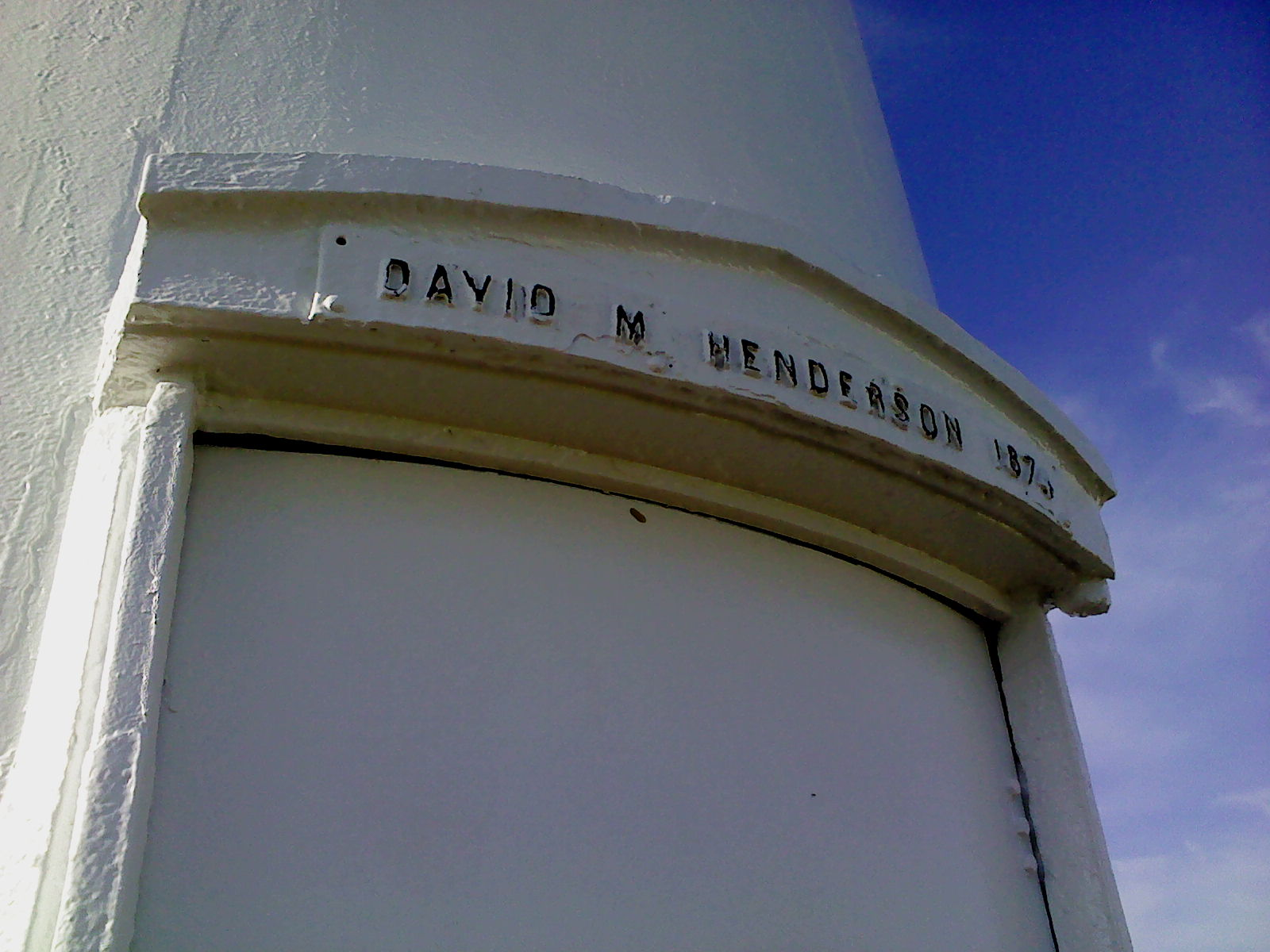 燈塔門額漁翁島燈塔總工程師韓得善銘記